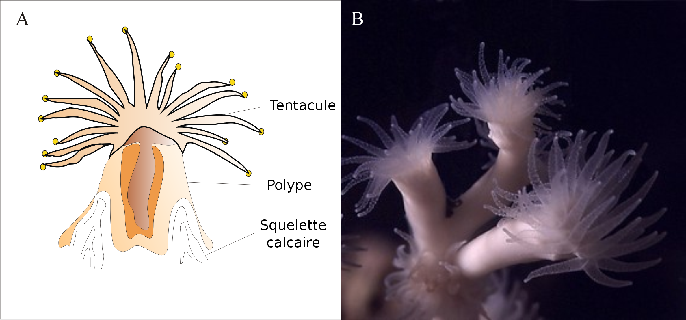 Description du polype de Lophelia pertusa en français